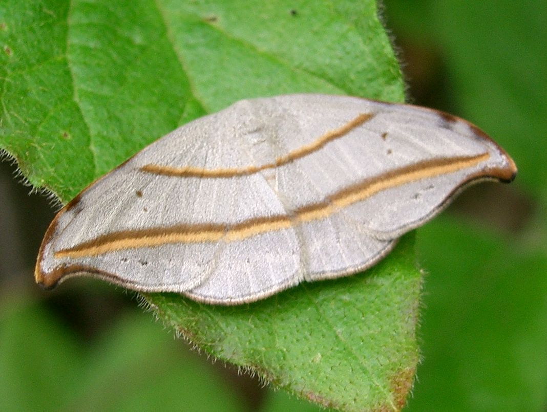 Nordstromia japonica